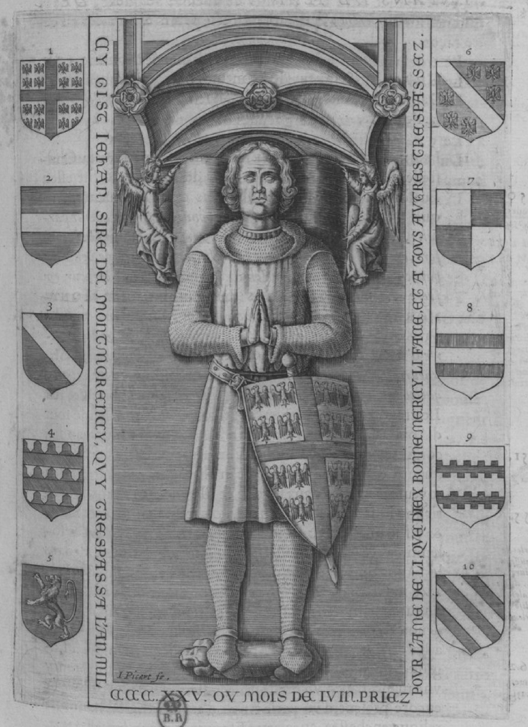 image issu de la collection du musée.